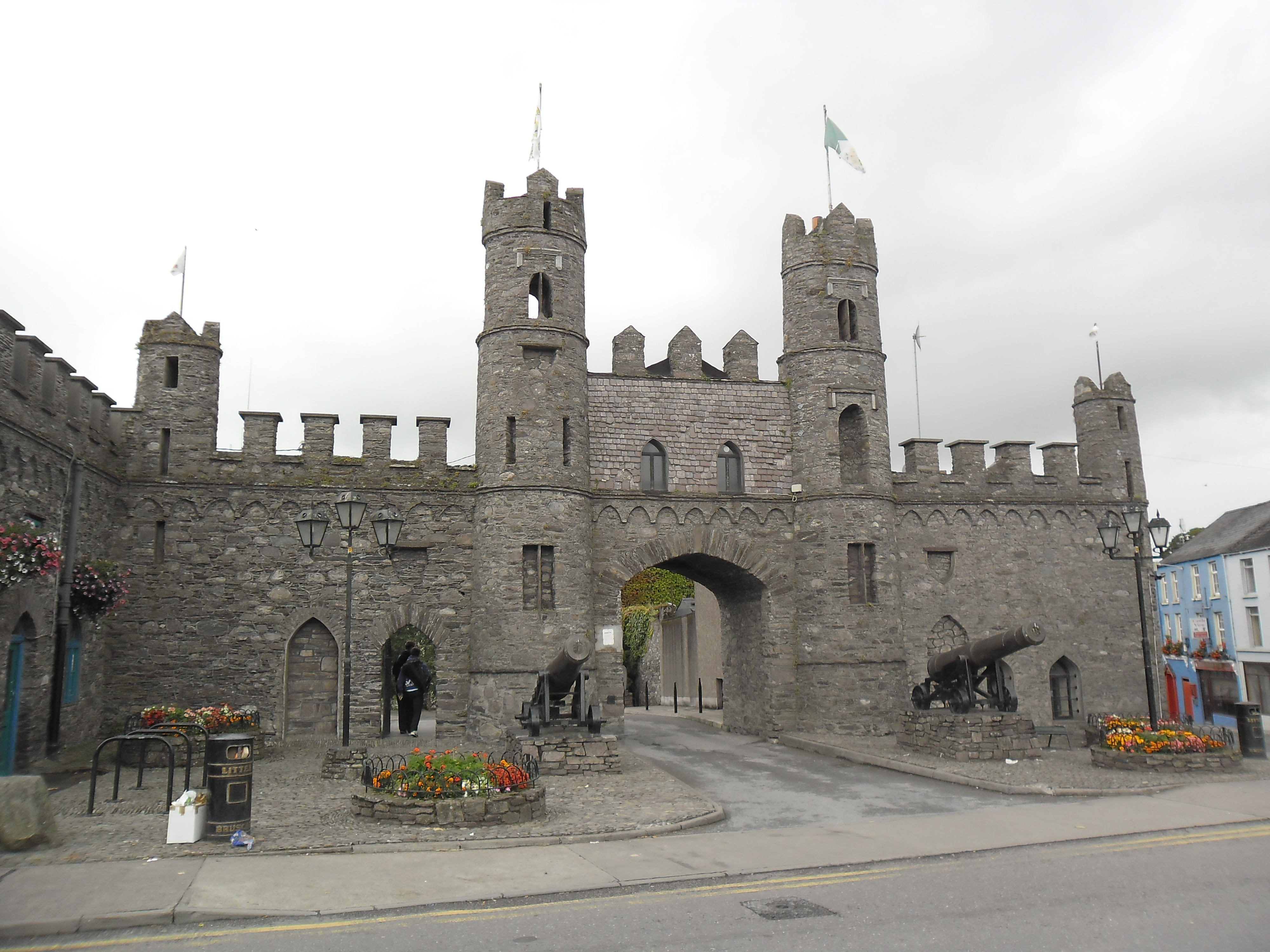 Château de Macroom, Irlande